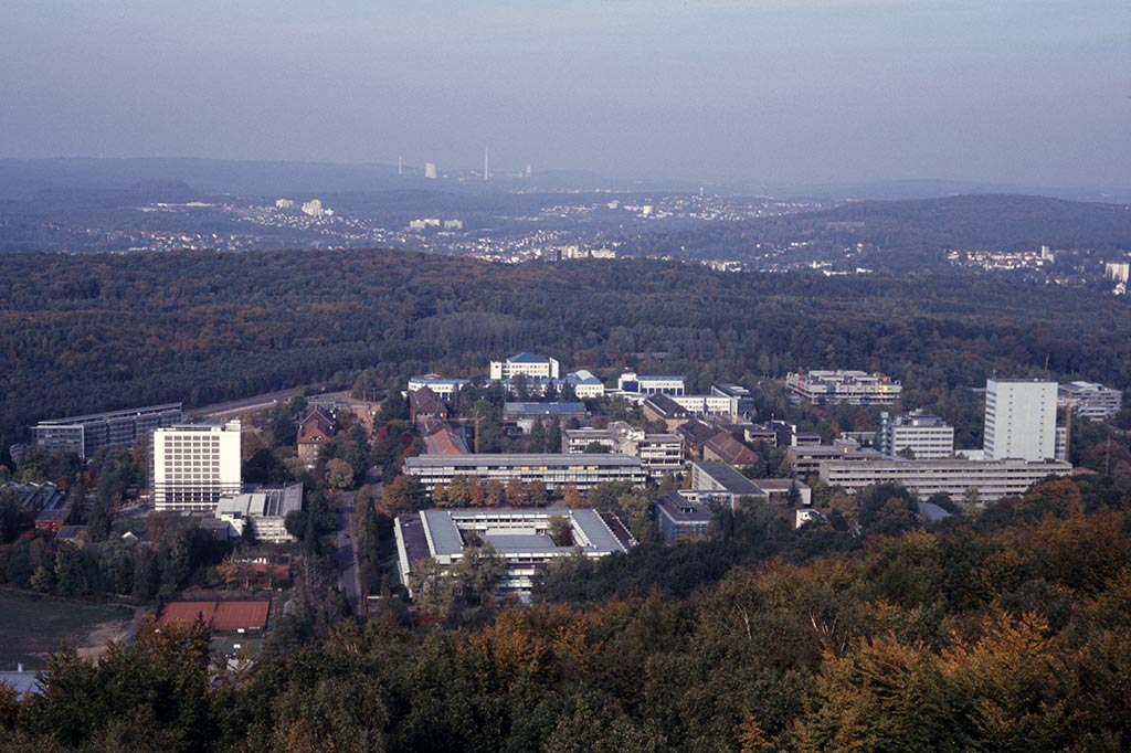 Blick auf die Universität des Saarlandes Photograph: Dirk Weishaar